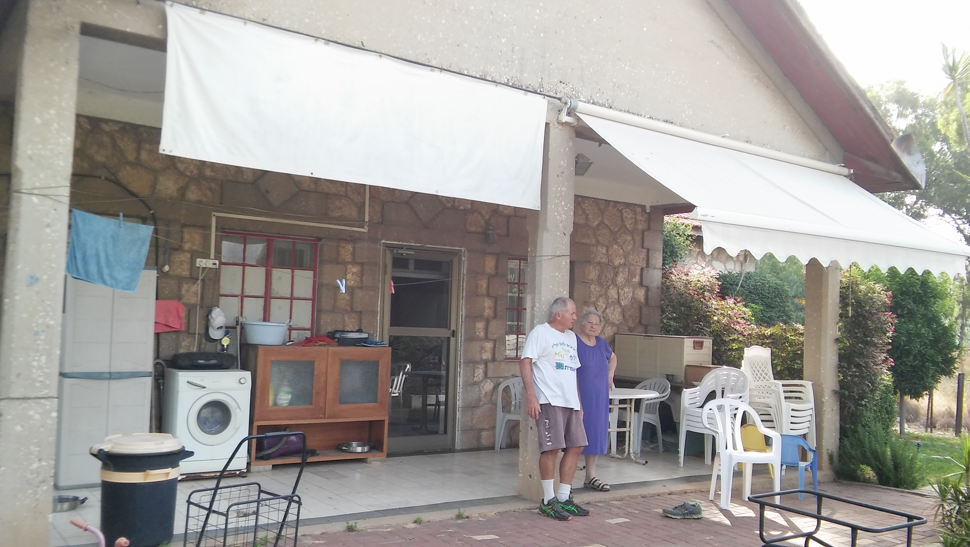 תחנת הרכבת הישנה של פתח תקווה